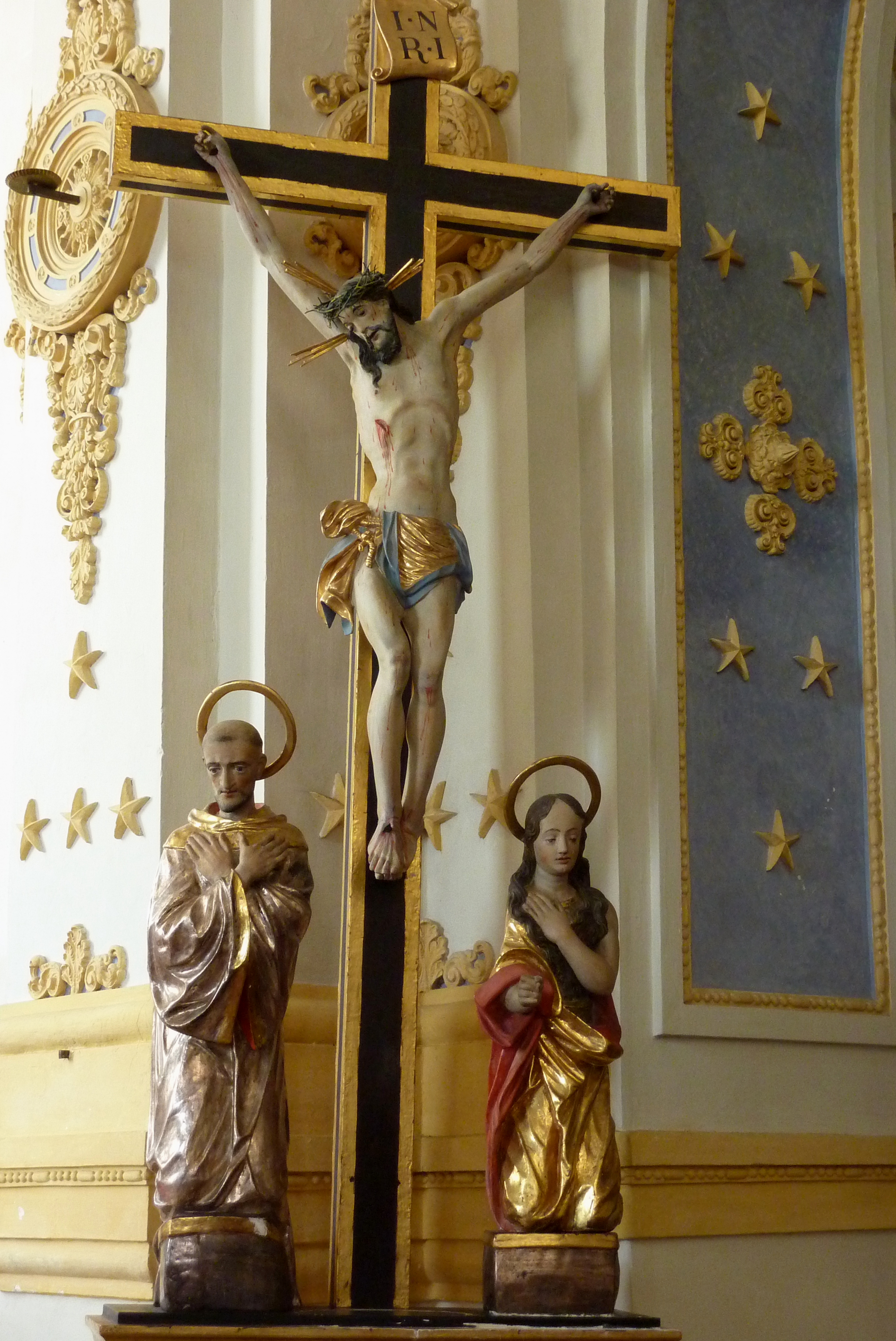 Katholische Pfarrkirche Mariä Himmelfahrt, ehemalige Klosterkirche des Zisterzienserinnenklosters Niederschönenfeld im Landkreis Donau-Ries (Bayern), von 1659 bis 1662 Wiederaufbau durch Konstantin Pader, Kreuzigungsgruppe mit Skulptur des hl. Bernhard (15. Jh.) und der Maria Magdalena (1. Hälfte 18. Jh.)